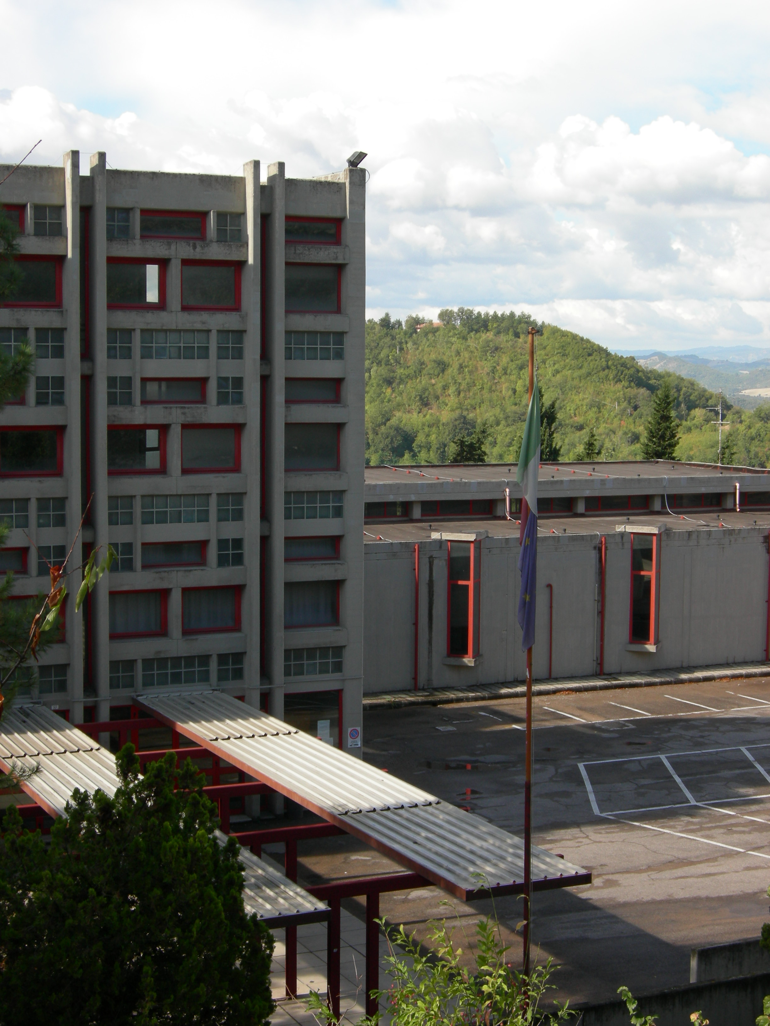 veduta esterna della sede dell'Istituto Tecnico Industriale Statale Enrico Mattei di Urbino